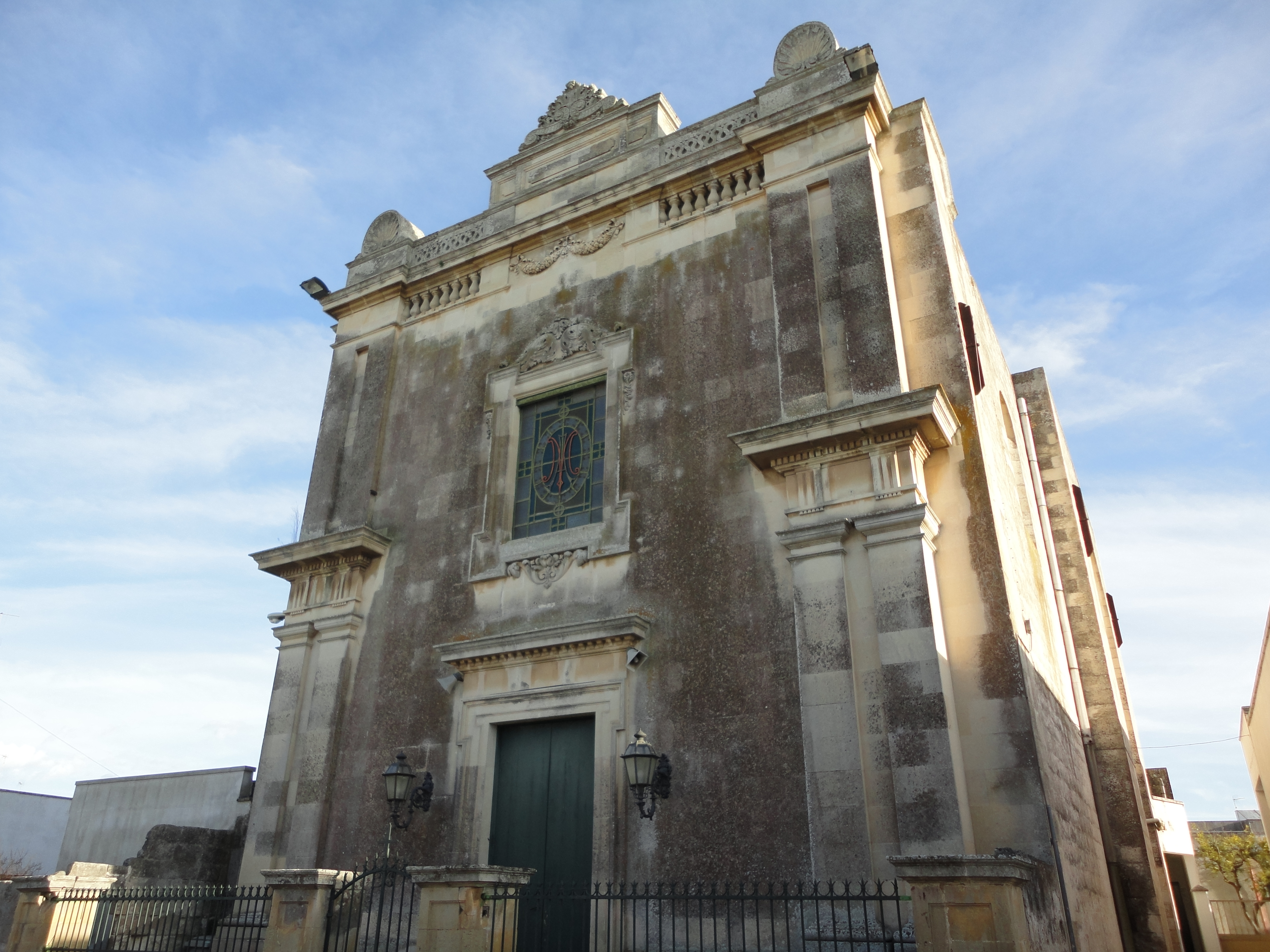 Chiesa Madonna delle Grazie Surano, Lecce